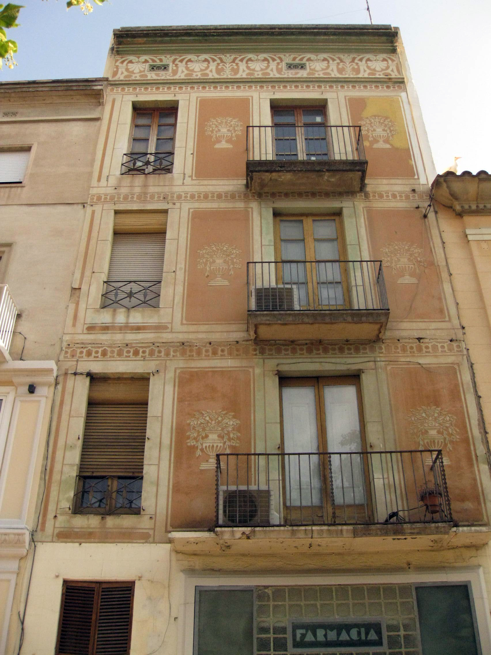 Habitatge a la rambla Sara Jordà, 11 (Figueres)